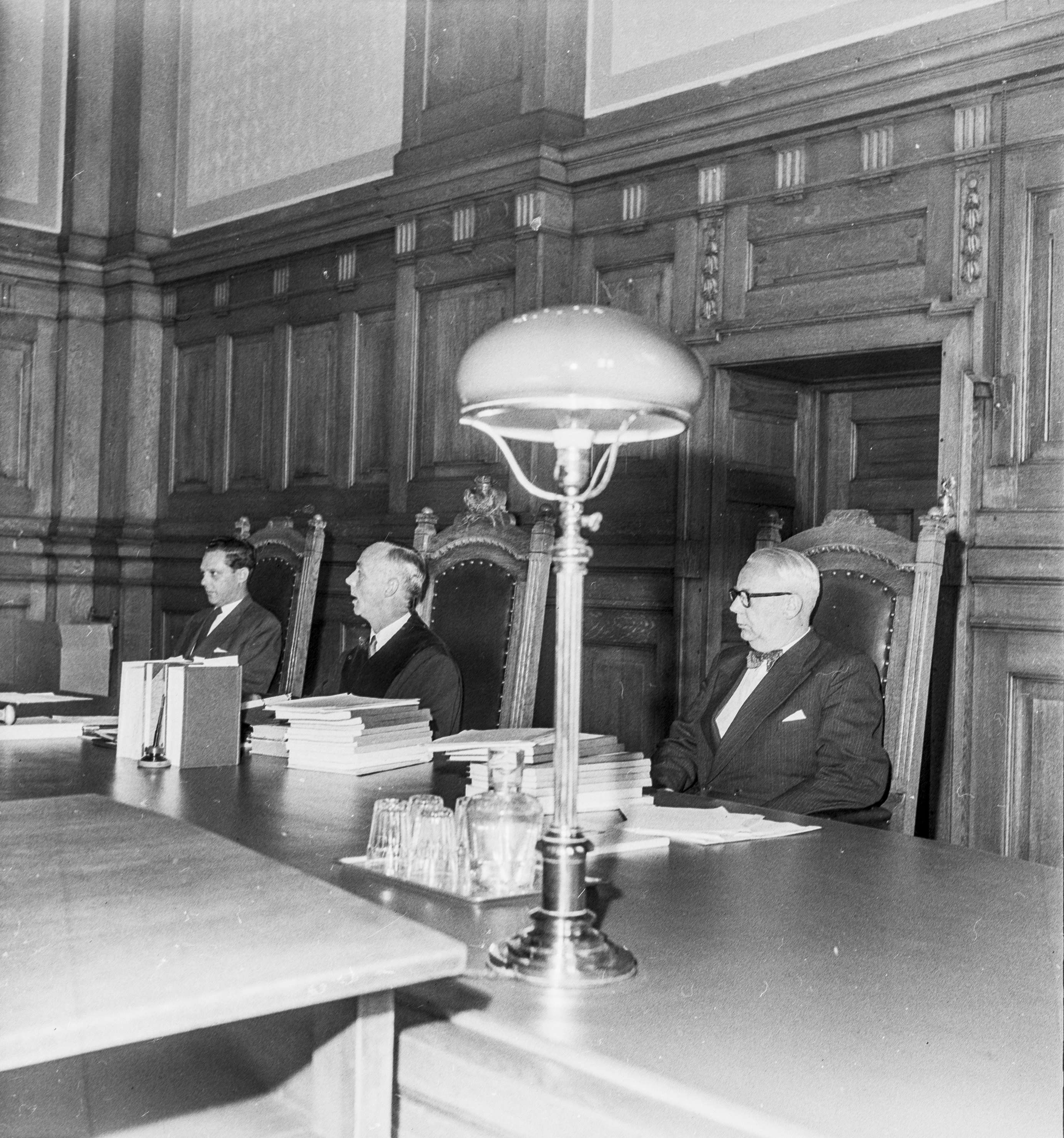 Foto overført fra Riksarkivets album «Rettsaken mot Agnar Mykle og Harald Grieg» på Flickr med følgende beskrivelse: Etter utgivelsen av Sangen om den røde rubin i 1956 ble Agnar Mykle og direktøren i Gyldendal, Harald Grieg, tiltalt etter straffelovens § 211 nr.1b, for utgivelse av utuktige skrifter. Det ble ført straffesak både mot dem og mot boka. Etter dom i Oslo byrett 10. oktober 1957 ble de tiltalte frikjent på grunn av rettsvillfarelse. Boka ble derimot gjort ulovlig og restopplaget inndratt. Det ble slått fast at romanen var utuktig. Boka og satsen til boka skulle etter ordre fra Riksadvokaten øyeblikkelig beslaglegges hos forlaget og i alle landets bokhandler. Dommen ble anket og opphevet av Høyesterett 9. mai 1958. Disse bildene stammer fra Billedbladet NÅ sin dekning av saken. Behandling av ankesak i Høyesterett 9. mai 1958 i forbindelse med utgivelsen av Sangen om den røde rubin. Fotograf: Fjørtoft, Bjørn, Billedbladet NÅ, Riksarkivet (RA/PA-0797/U/Ue/L0064/0012)